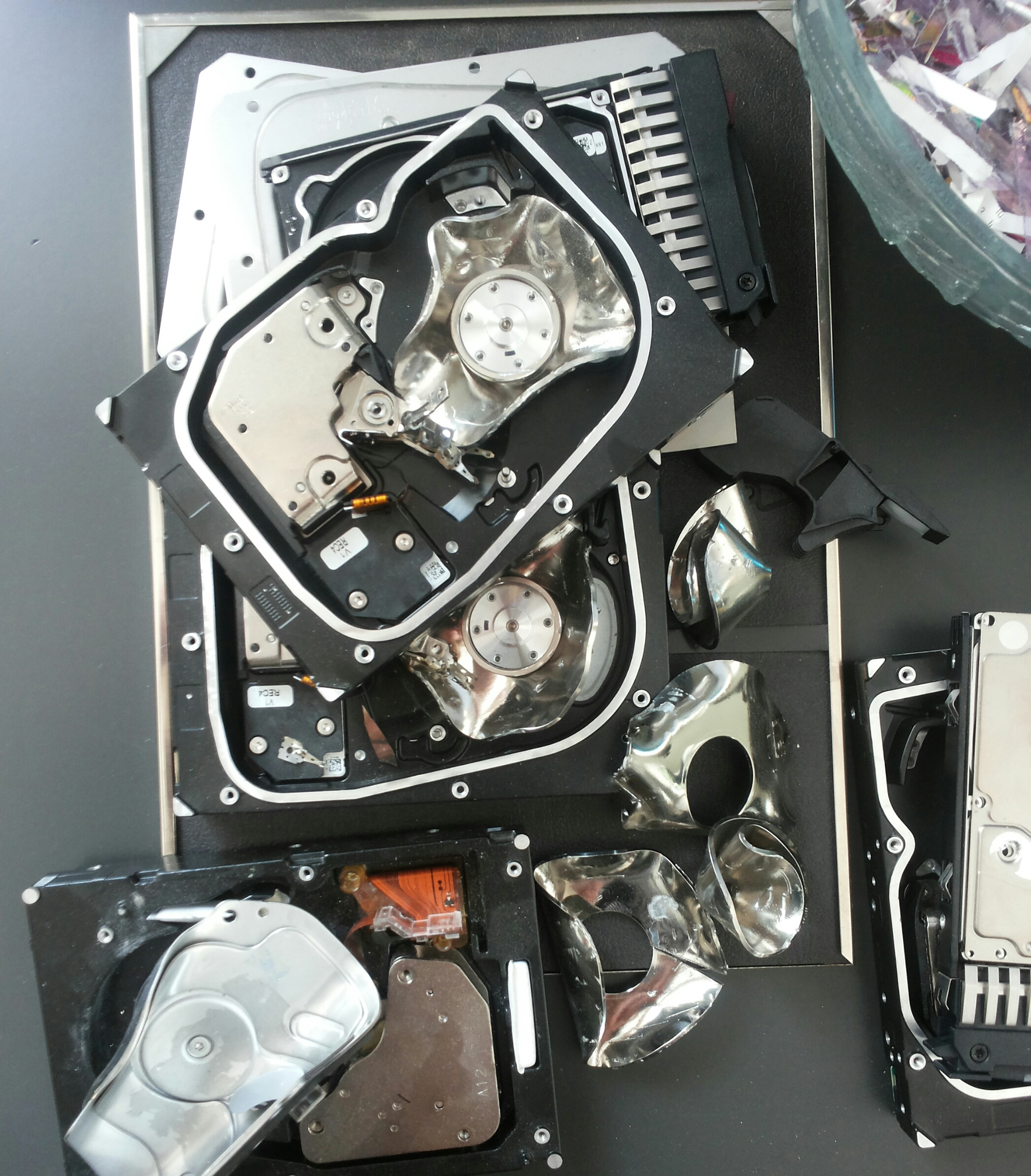 Vabariigi Valimiskomisjoni Elektroonilise Hääletuse Komisjoni poolt häälte salajasuse tagamiseks hävitatud kõvakettad.